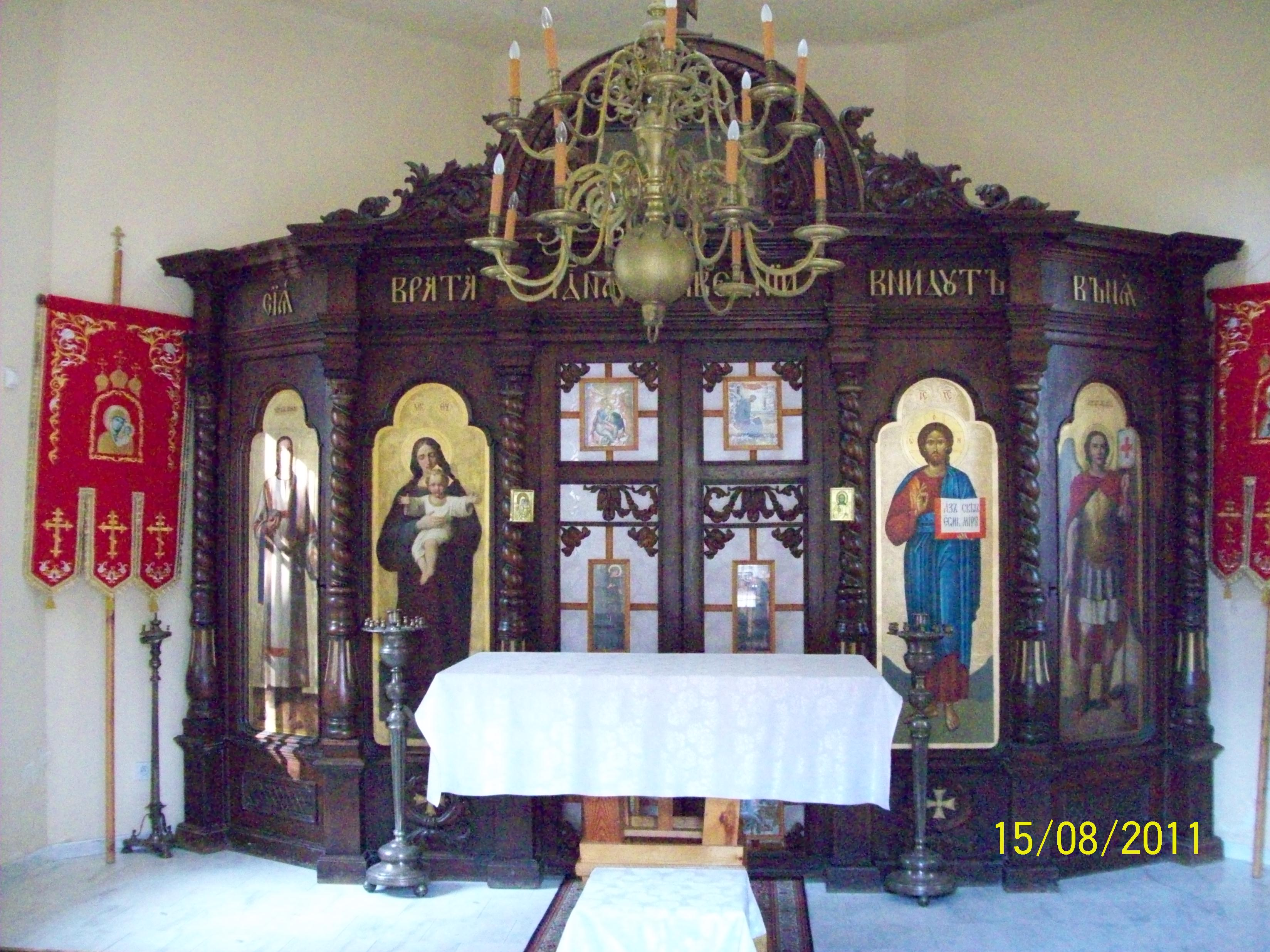 Ikonostas w prawosławnej kaplicy cmentarnej św. Michała. Płock, ul. Norbertańska 25